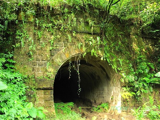 台鐵宜蘭線第一代三貂嶺隧道 was filmed by TDCKW on 20121007